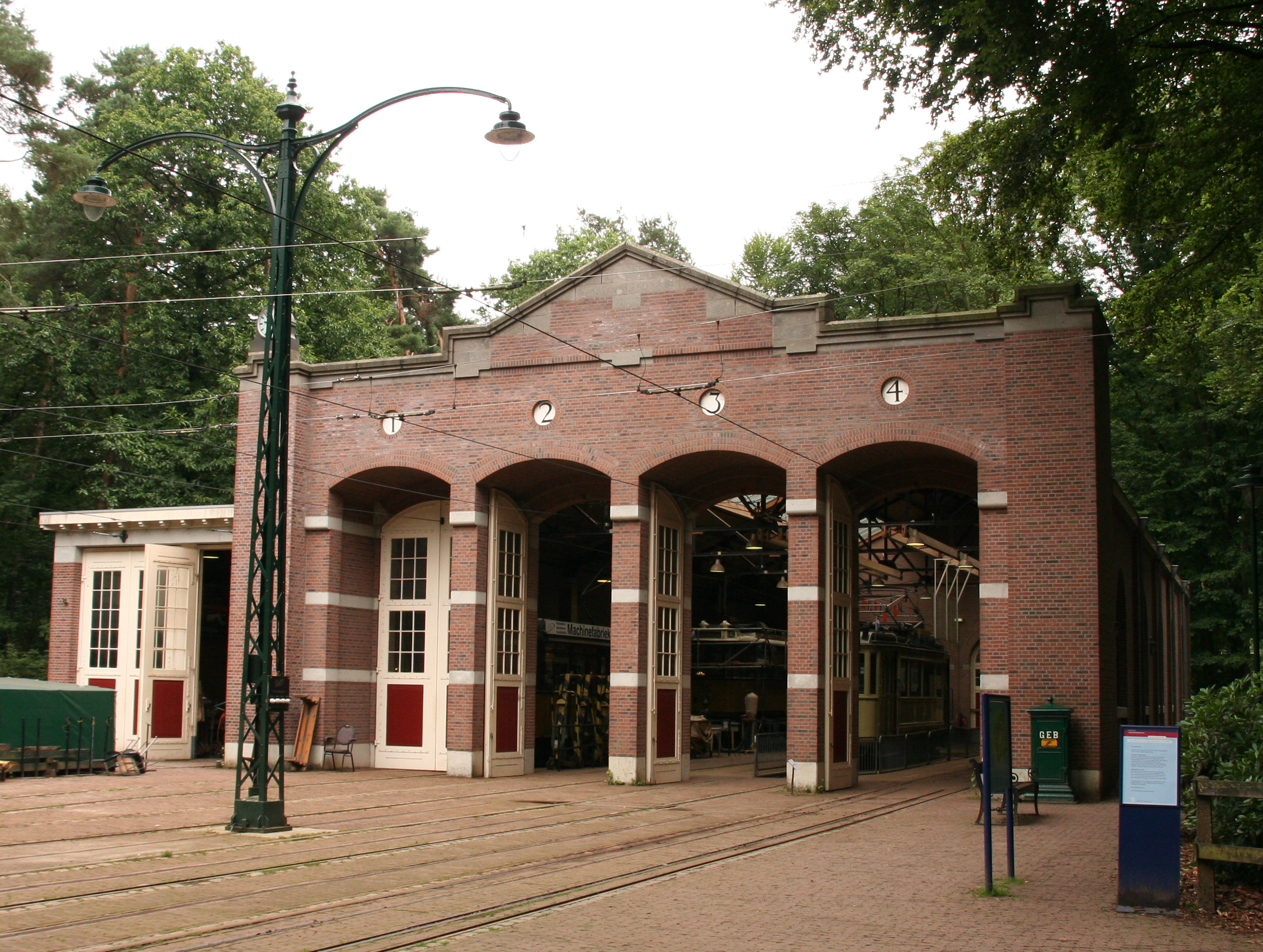 Replica uit 1996 van de in 1944 verwoeste Arnhemse Tramremise, te zien in het Nederlands Openluchtmuseum te Arnhem.